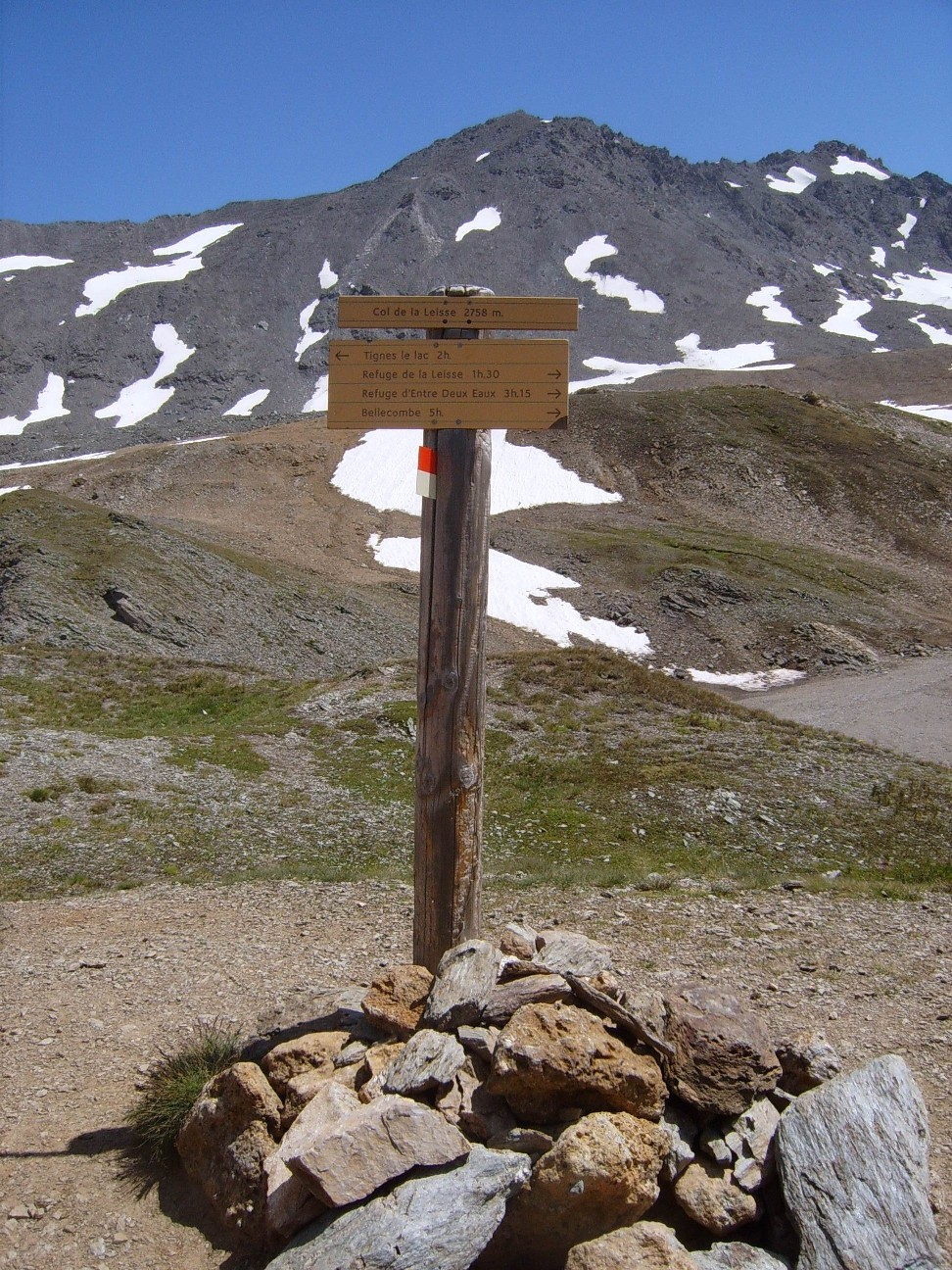 Col de la Leisse, entre Tignes et Termignon.